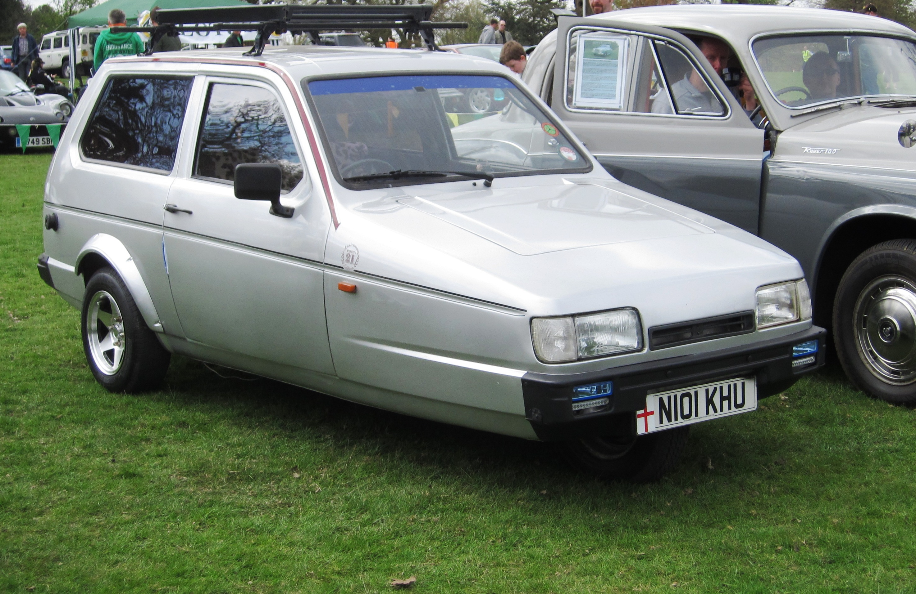 Reliant Robin (1995)